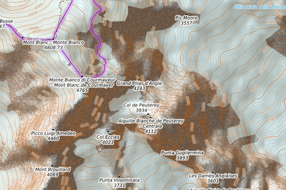 carte réalisée sur umap This map may be incomplete, and may contain errors. Don't rely solely on it for navigation.